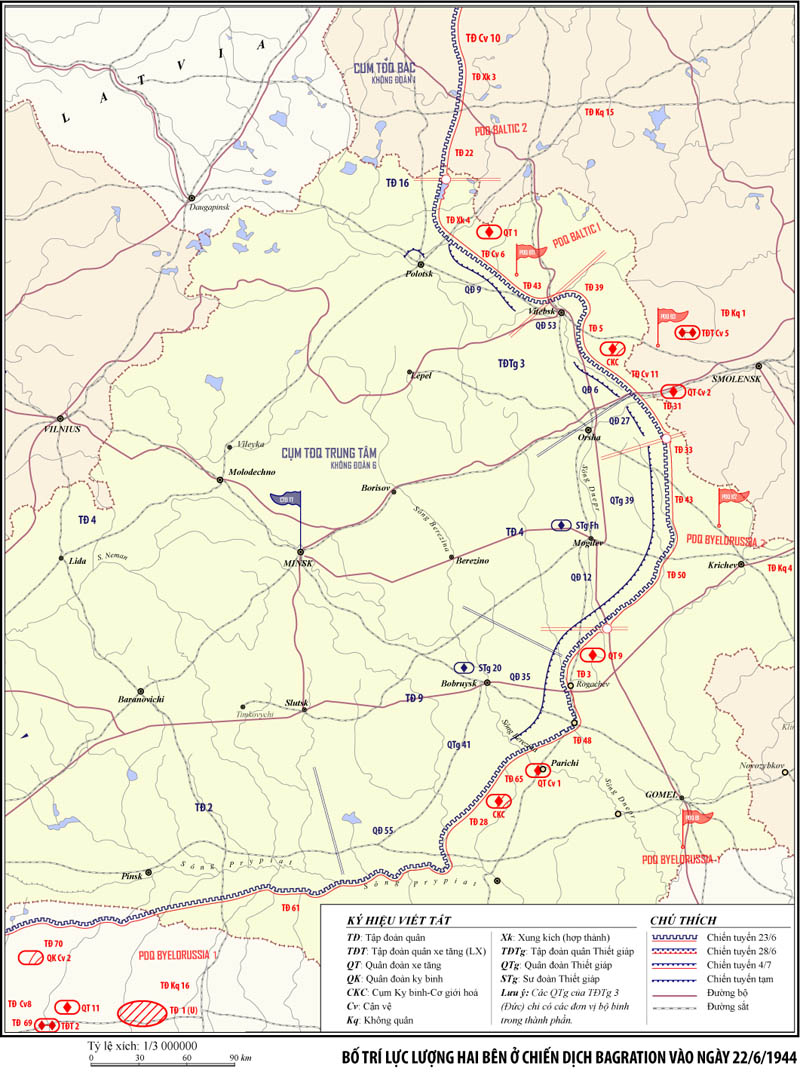 Bố trí binh lực hai bên trước chiến dịch Bagration.